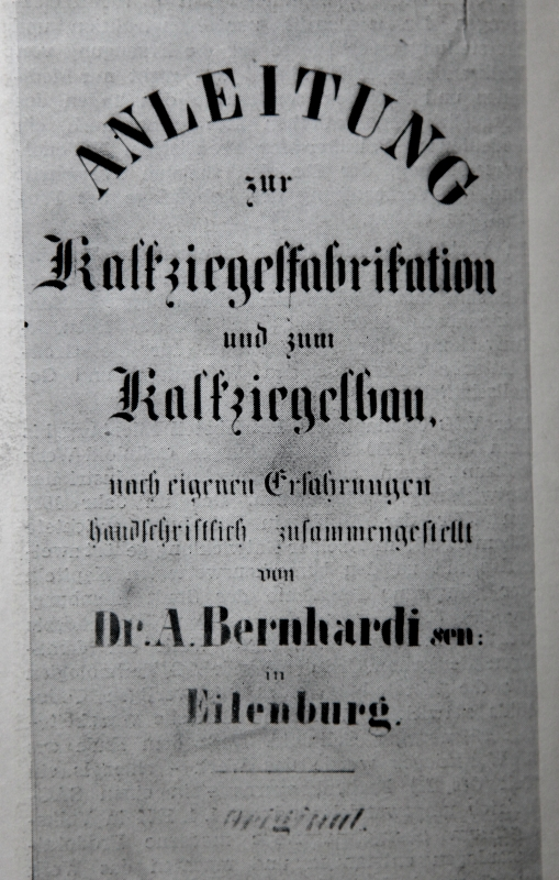 Anleitung Dr. Anton Bernhardis zur Kalkziegelfabrikation